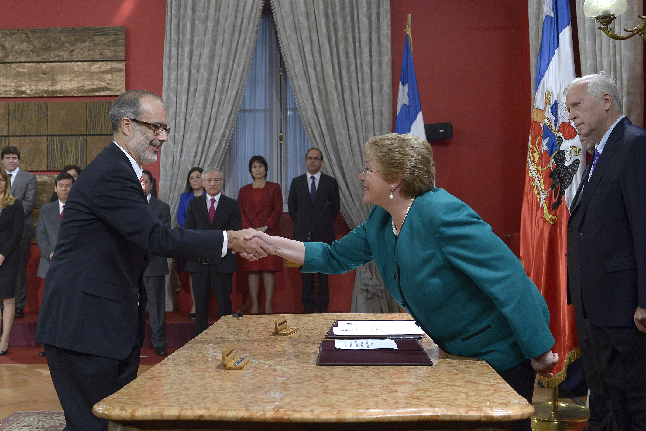 11/05/15 Cambio de Gabinete, Asume Ministro Marcelo Diaz.